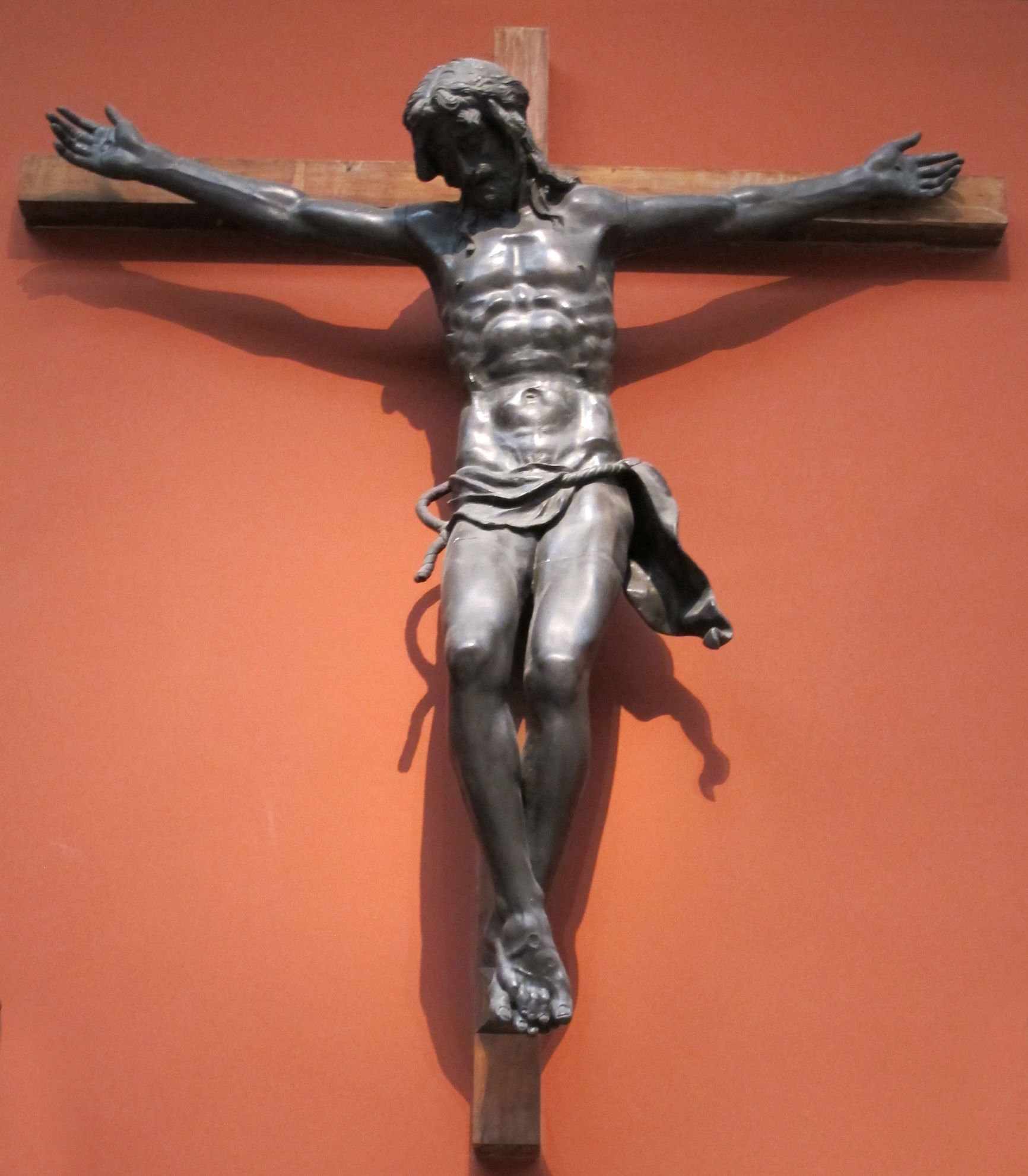 Museo pushkin, calchi, donatello, crocifisso di padova